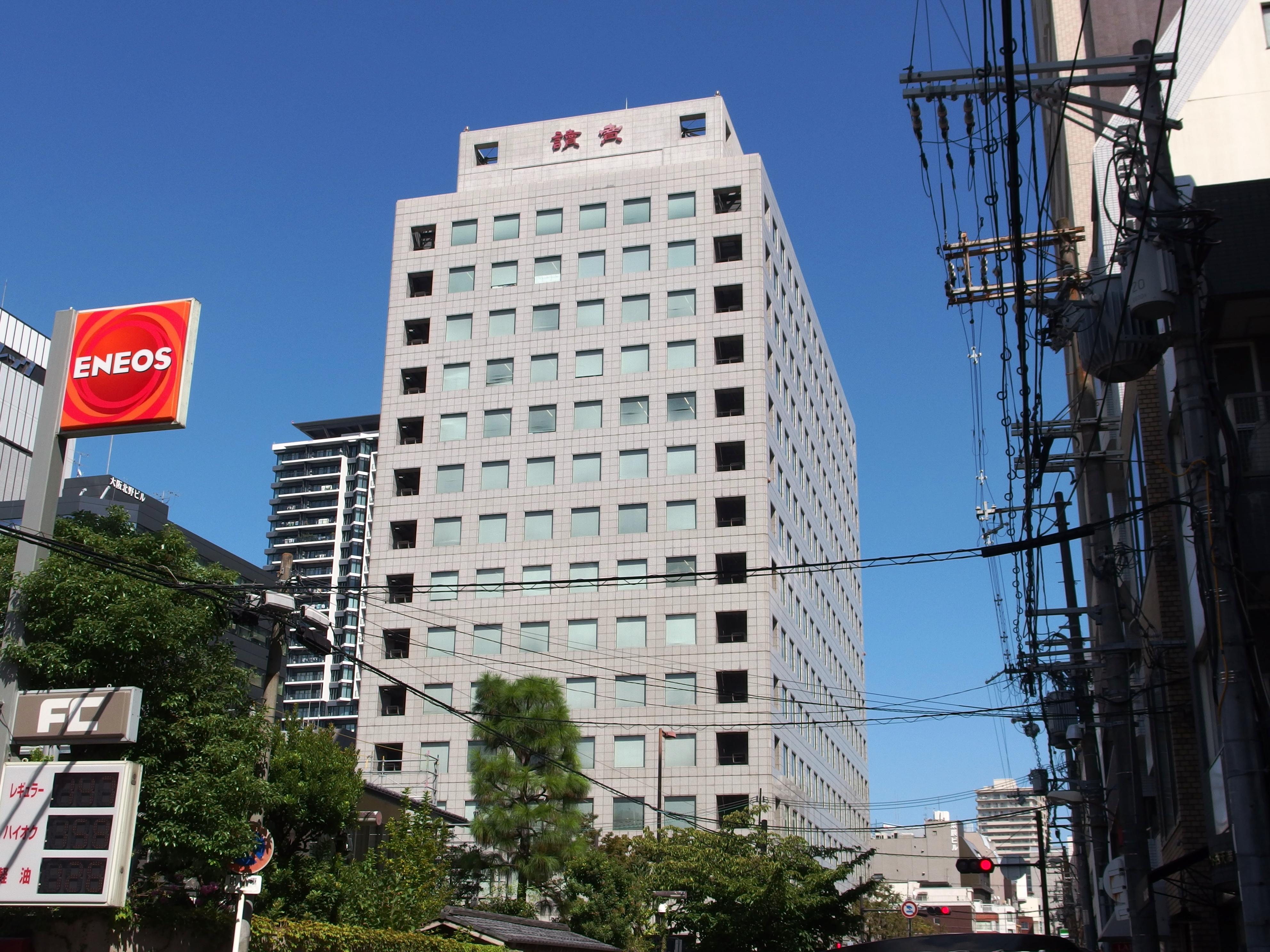 大阪市にある読売新聞大阪本社が入居する読売大阪ビル。